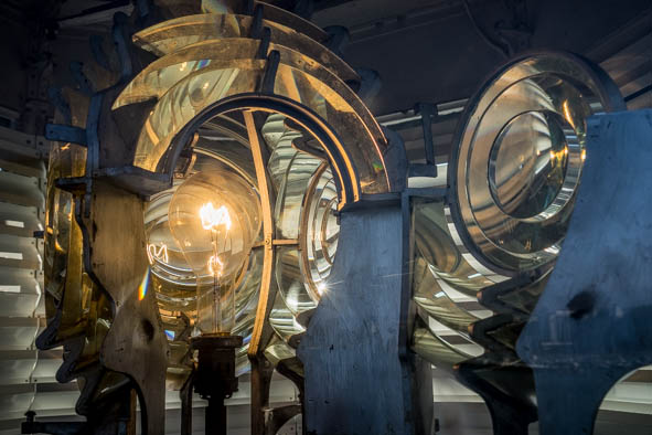 Lentilles ouvertes pour accéder à l'ampoule